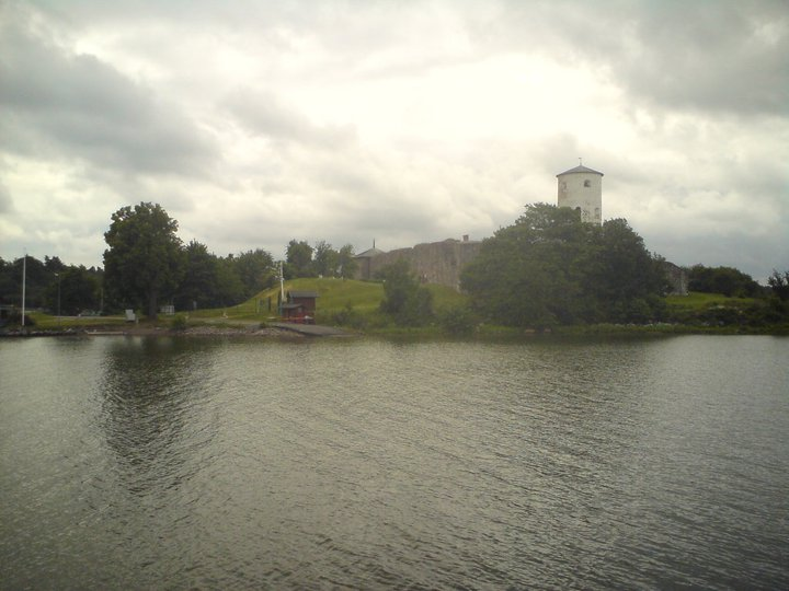 Stegeborg med färjeläget 2014